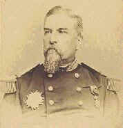 French general Auguste-Alexandre Ducrot (1817-1882)